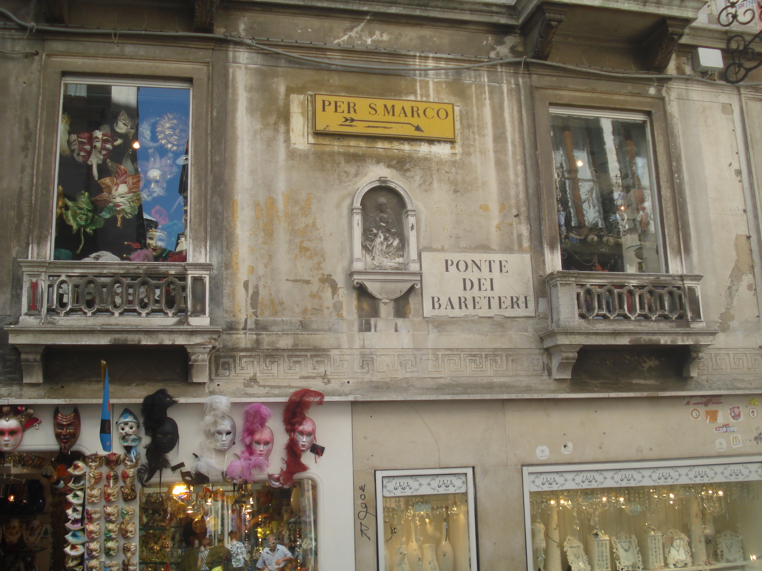 The bridge Ponte dei Pignoli in Venice